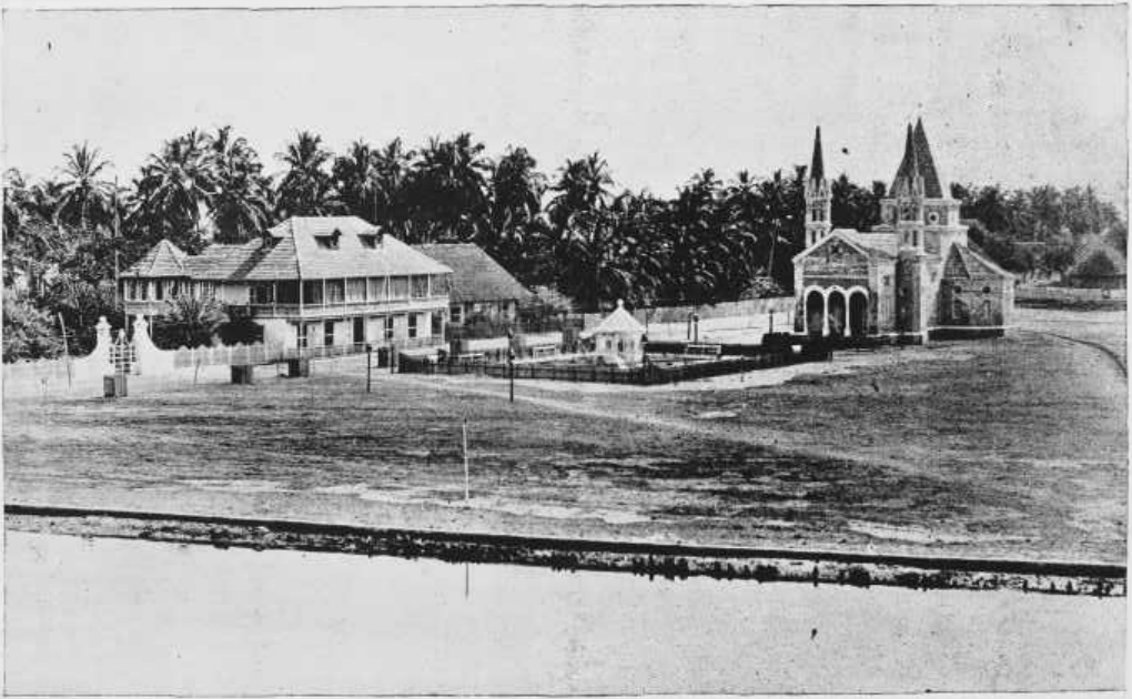 La casa del barrio El Cabrero en donde habitó Rafael Núñez y la Ermita de Nuestra Señora de Las Mercedes donde reposan sus restos.